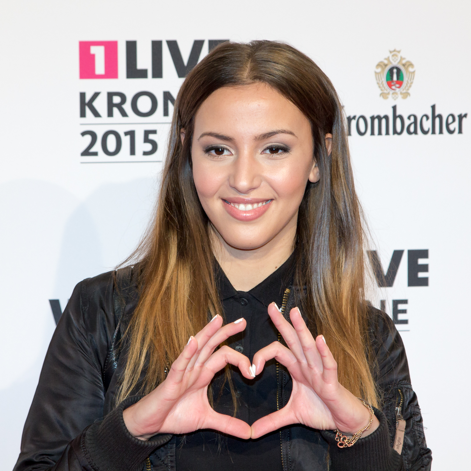 1liVE Krone 2015 - Namika